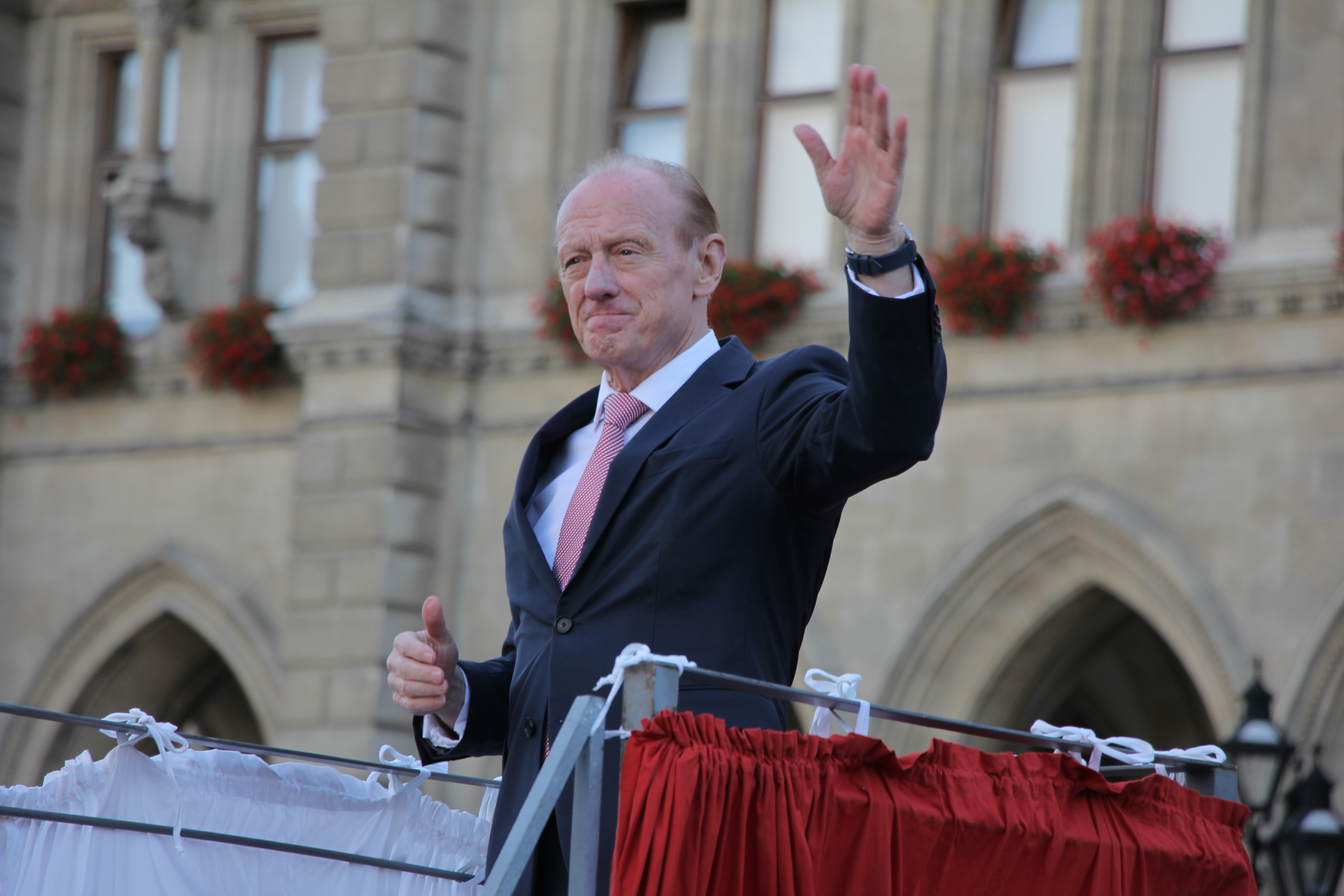 Impressionen von Österreichischen Blasmusikfest 2018 am Wiener Rathausplatz